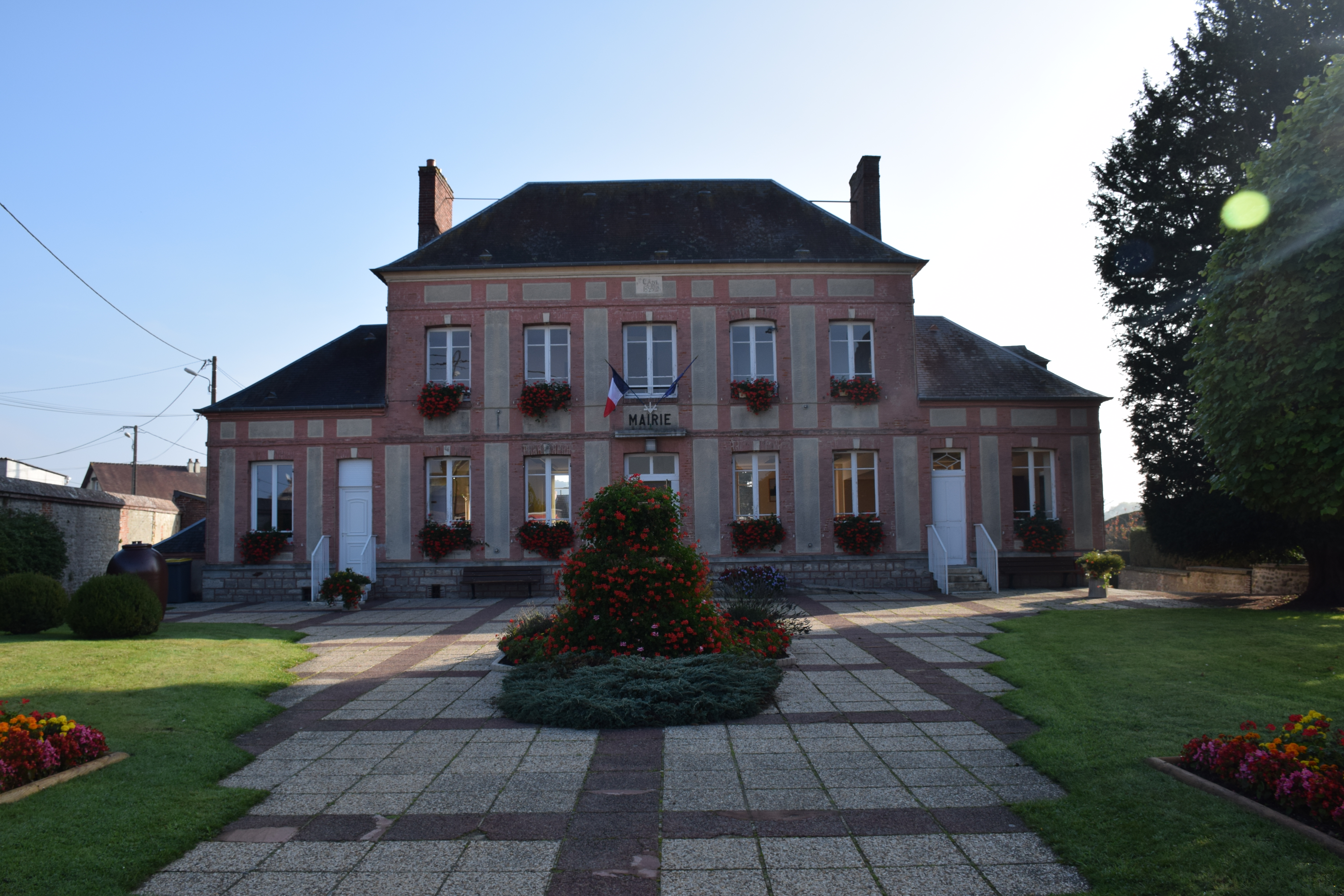 Mairie